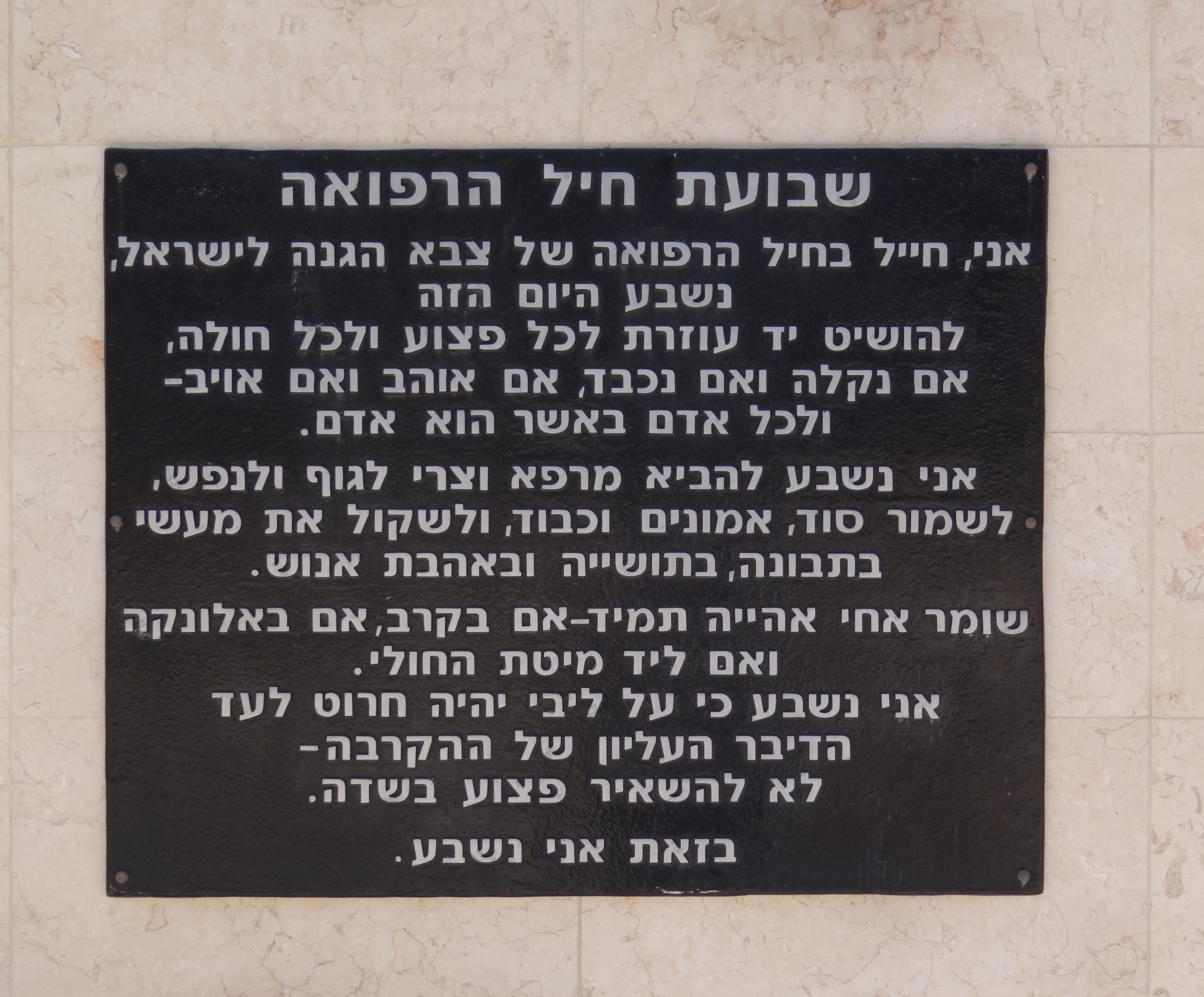 אנדרטת חיל הרפואה נמצאת בבסיס מרפ"א צפון בבה"ד 10 בחיפה. האנדרטה היא חלק מאתר ההנצחה המרכזי לחללי חיל הרפואה. סמוך לה חקוקים על קיר הנצחה שמותיהם שלאנשי חיל הרפואה שנפלו מאז מלחמת העצמאות, רופאים, חובשים, פרמדיקים ובעלי מקצועות ותפקידים נוספים בחיל הרפואה.